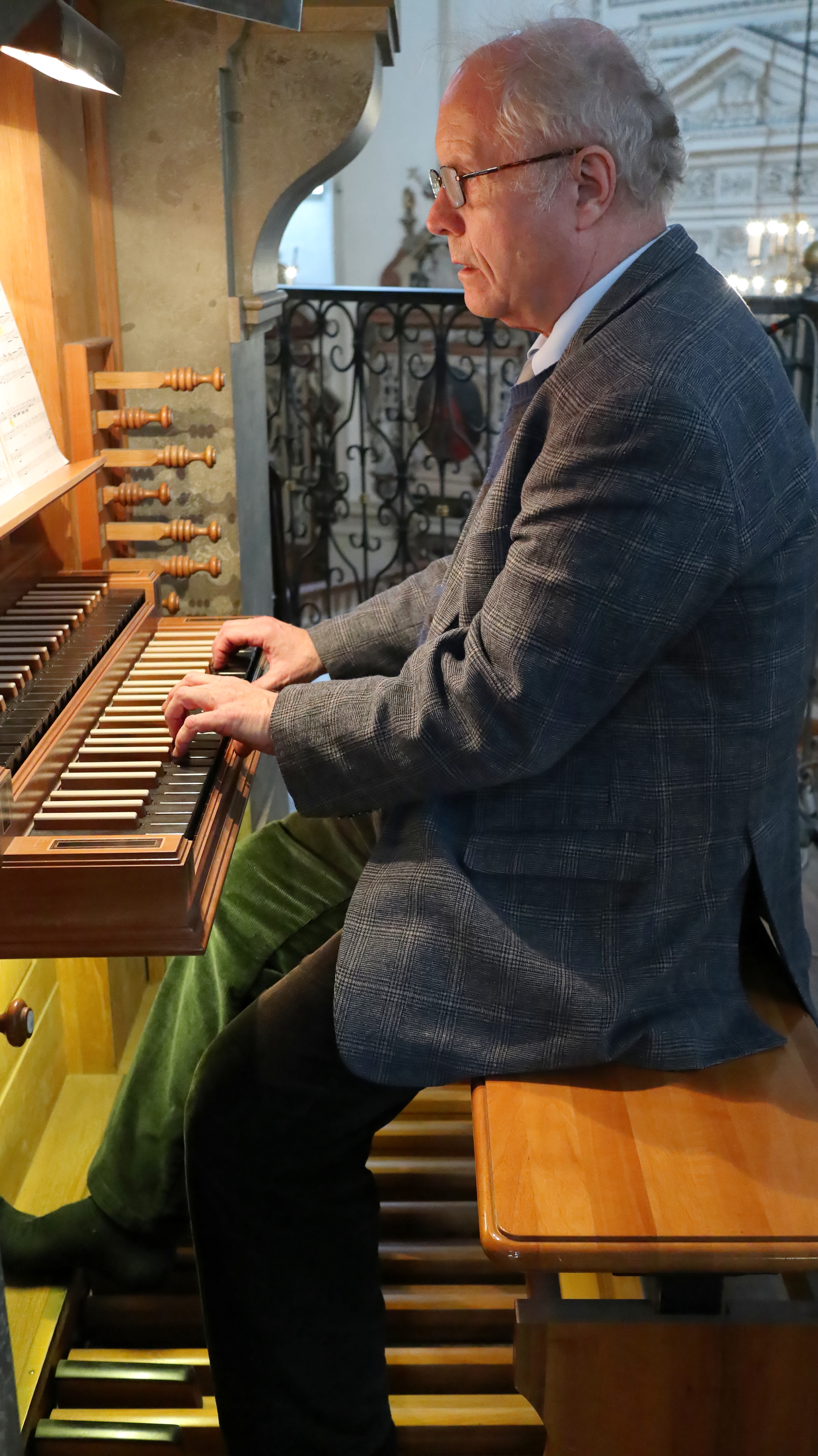 Kuppelorgeln im Salzburger Dom und Vorführung der Orgeln durch Domorganist Dr. Heribert Metzger und Organistin Sarah Kim.